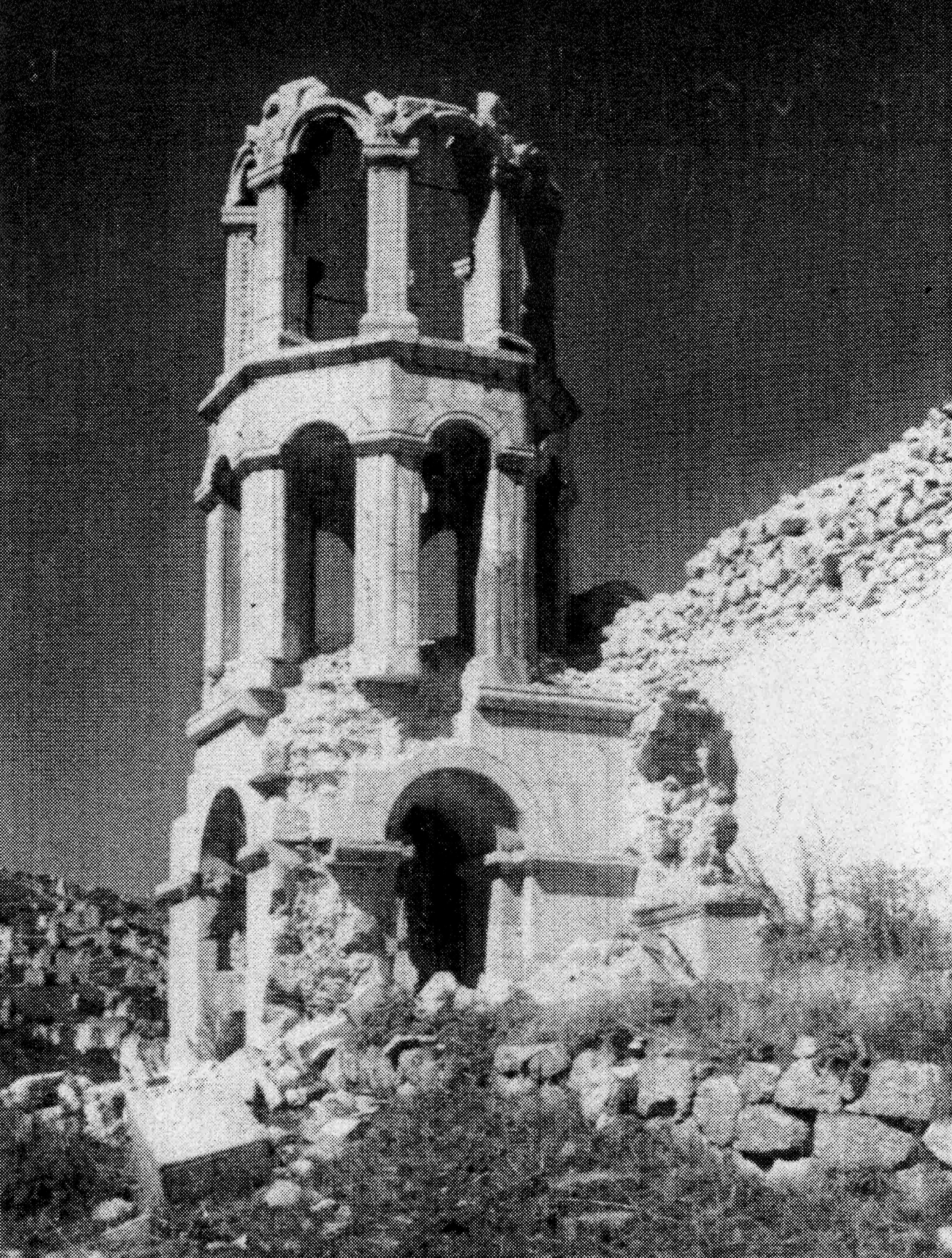 Կուսանաց վանքի զանգակատունը